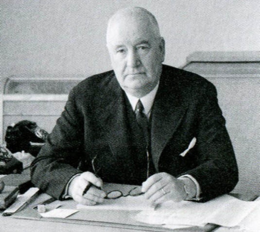 Hans Theodor Holm, VD i LM Ericsson 1933-1942